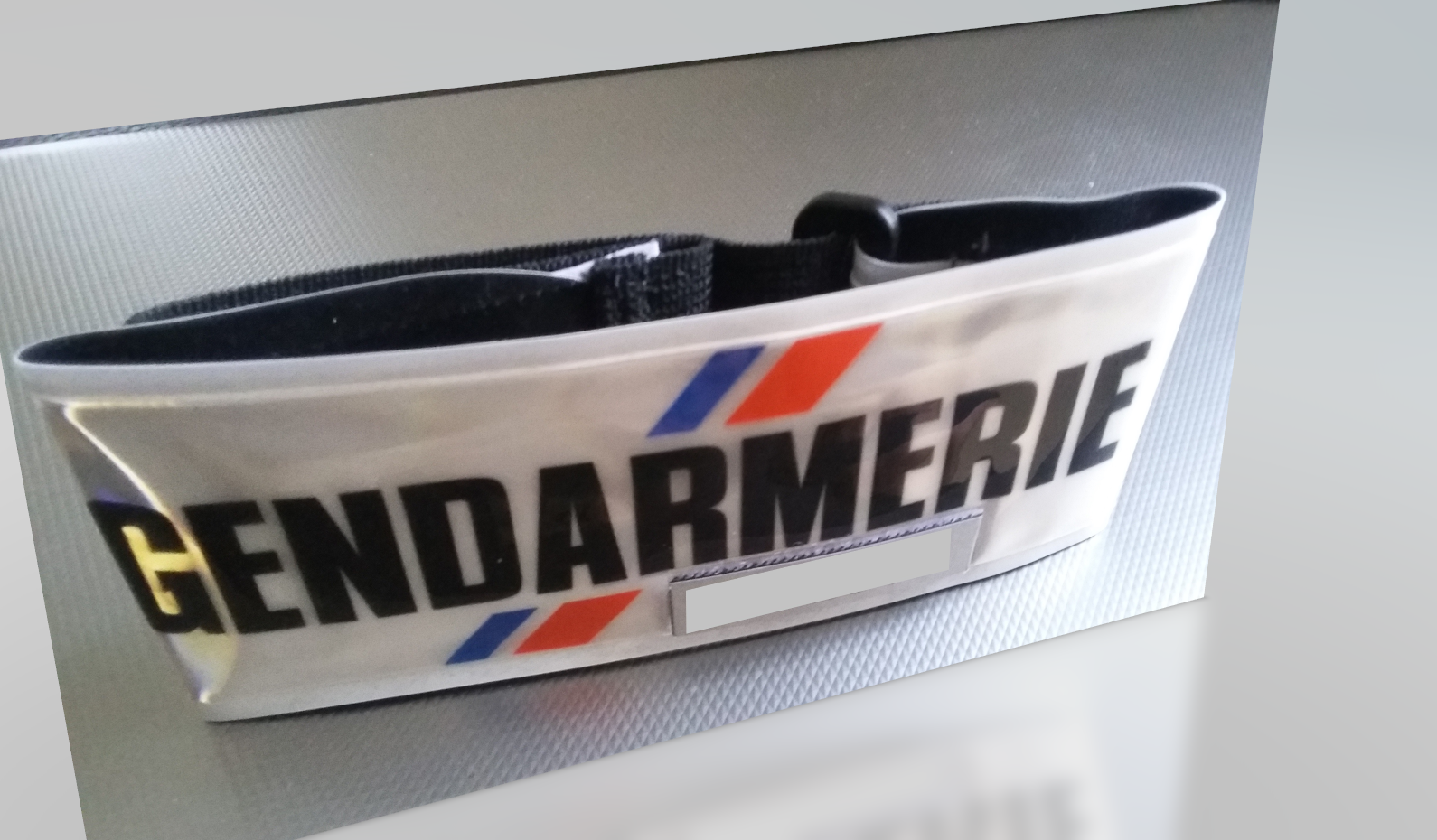 brassard de tenue civile pour la Gendarmerie (modèle règlementaire norme Ministère de l'Intérieur)